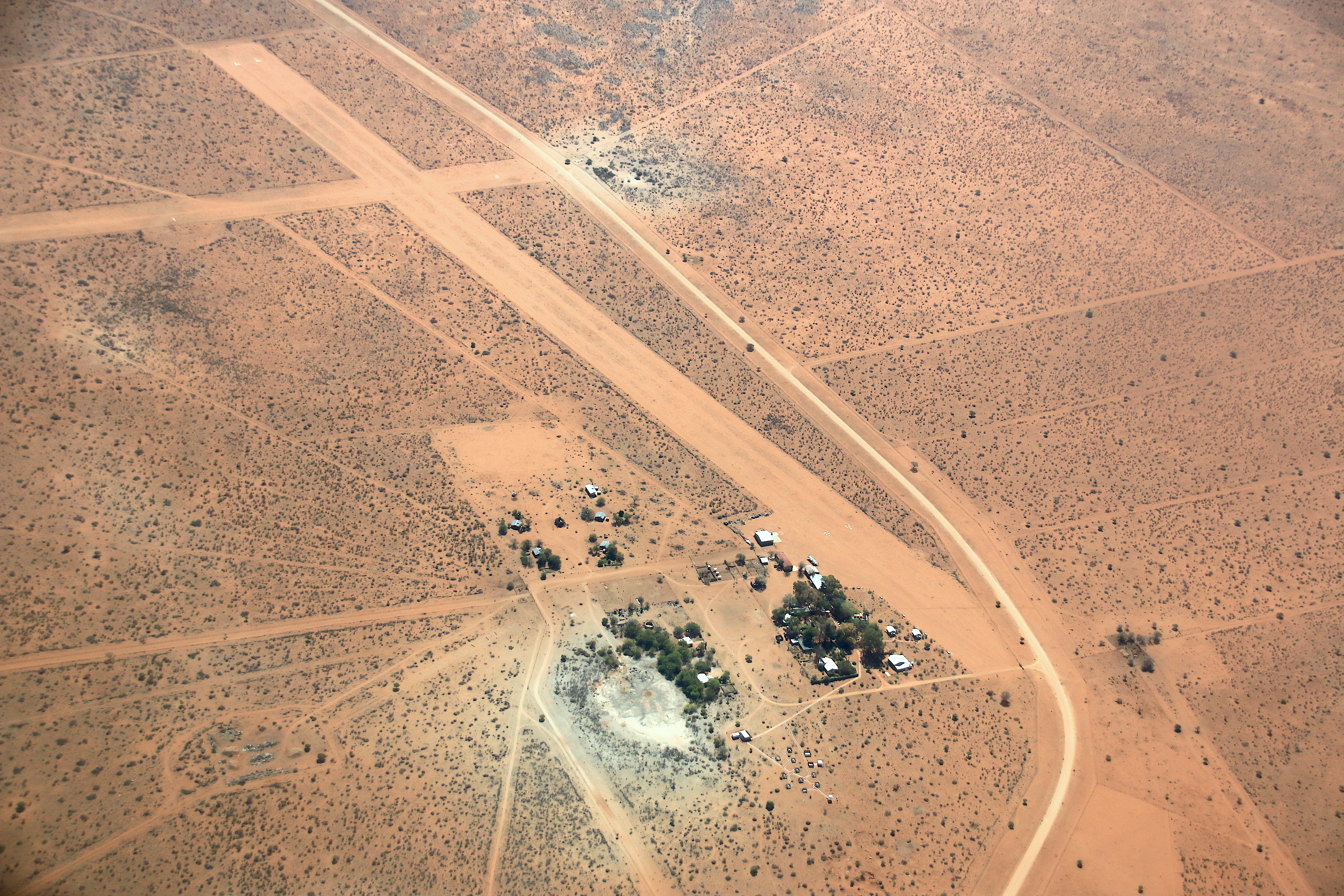 Segelfarm Kiripotib Namibia (2019)